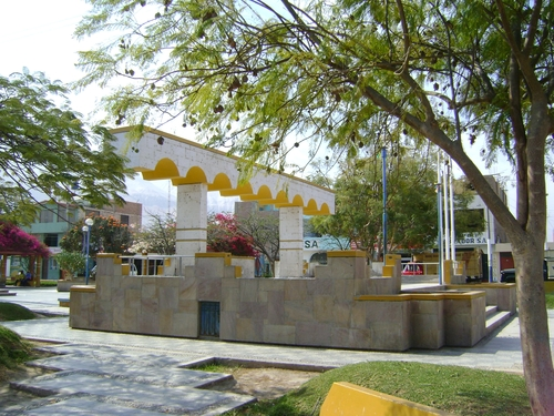 Foto todo de la palza 28 de julio tomada por mi persona